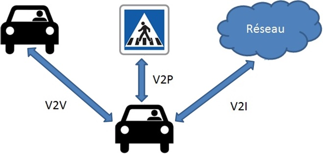 V2X